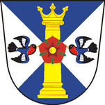 znak obce Lutonina